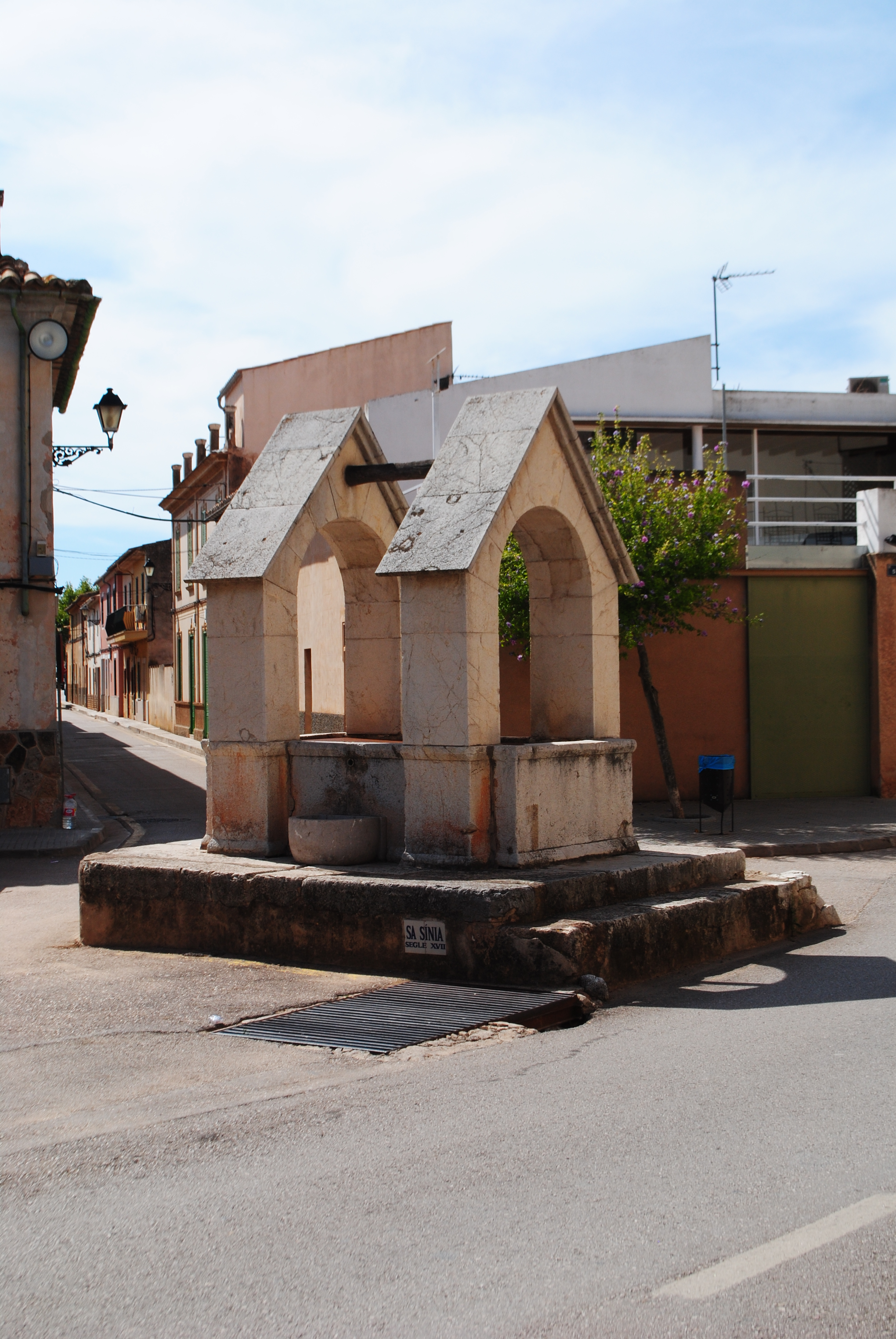 Sa Sínia, pou del segle XVII restaurat.